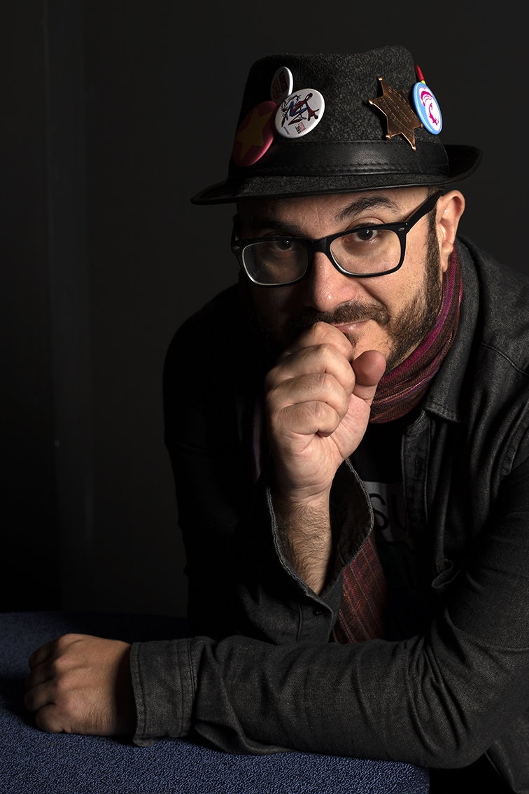 Sergio Algozzino